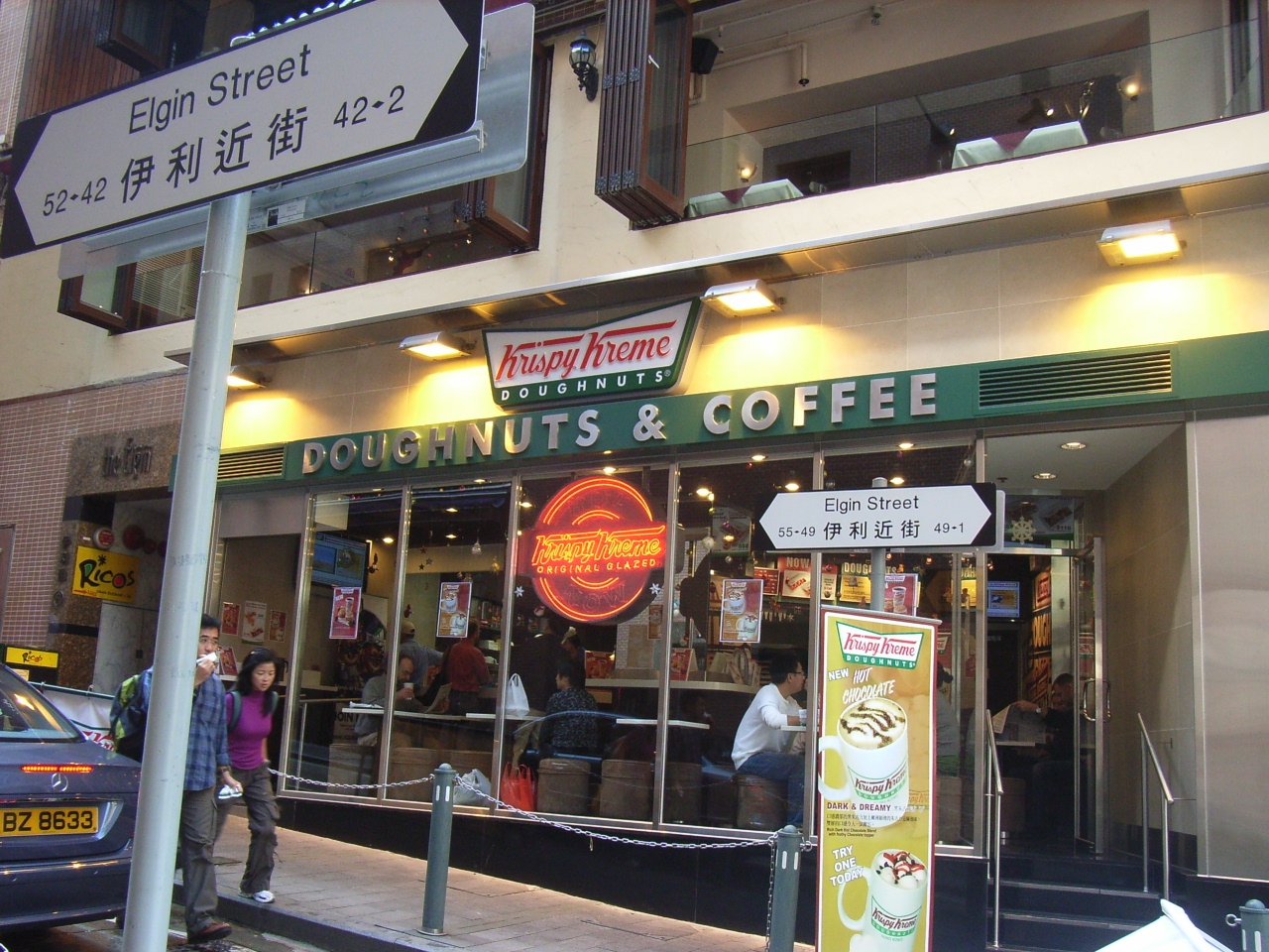 伊利近街, Elgin Street, Central, Hong Kong